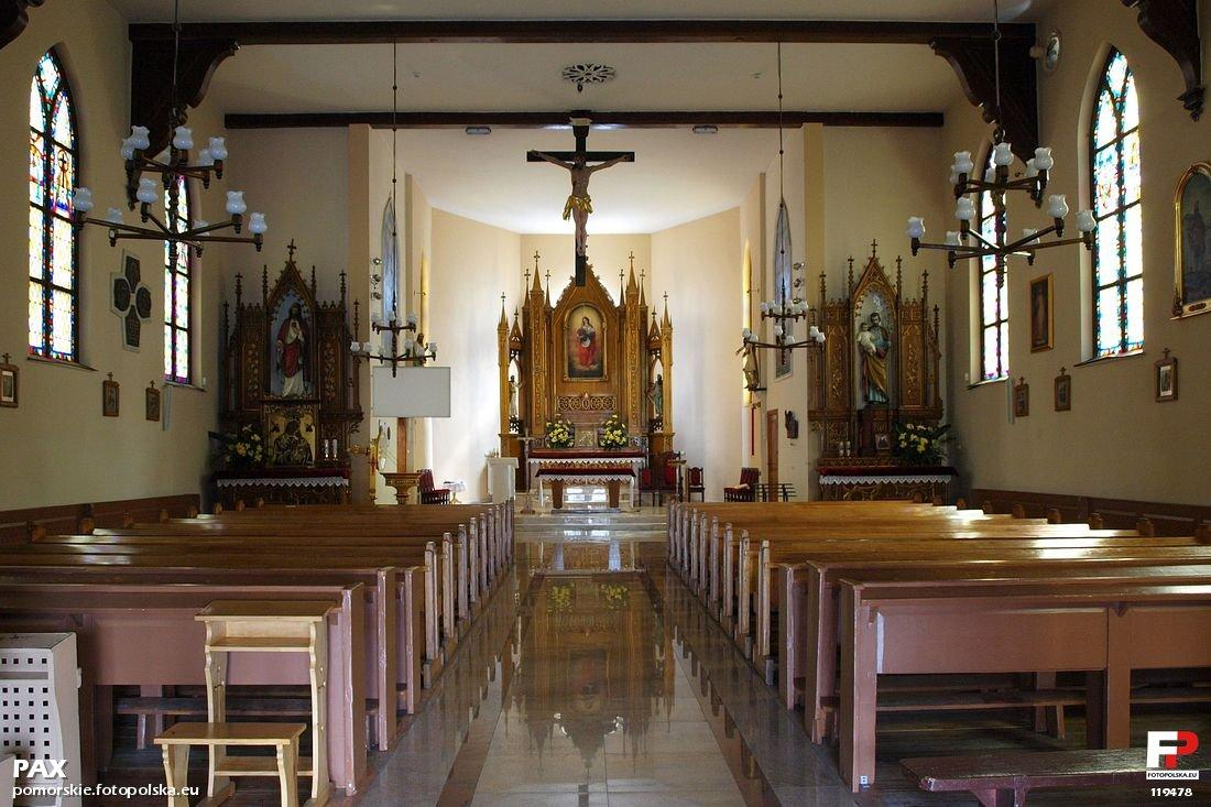 Jednonawowe wnętrze kościoła.